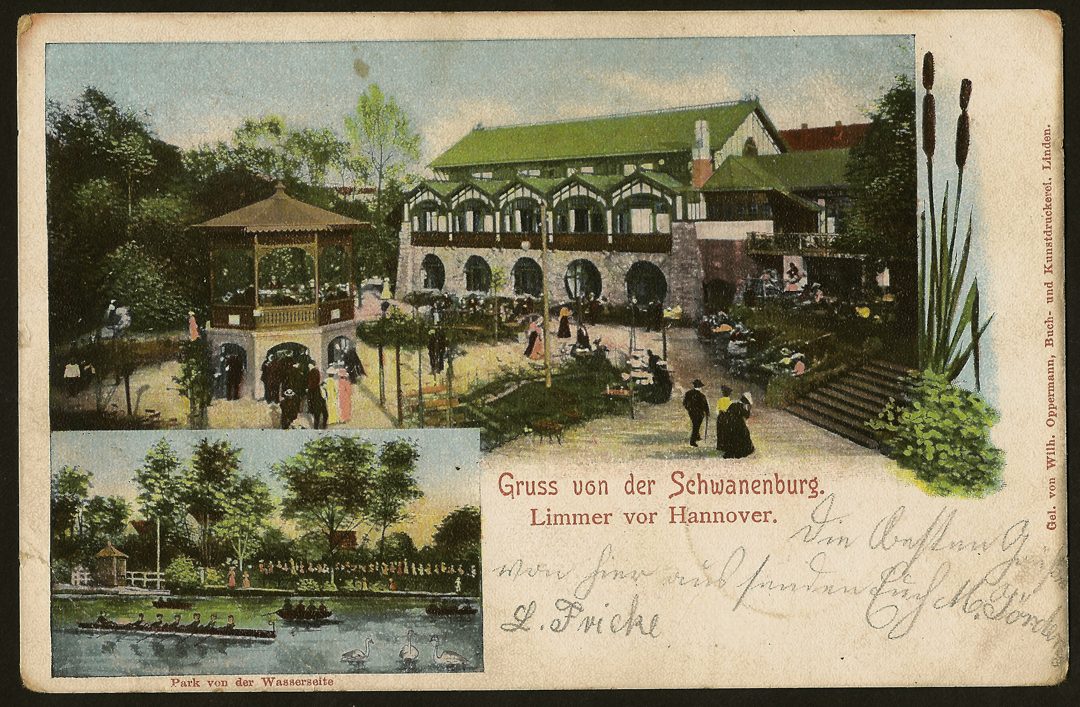 "Gruß von der Schwanenburg. Limmer vor Hannover", titelt diese farbig lithographierte Ansichtskarte mit einem Blick in das Gartengelände und den "Park von der Wasserseite" mit Ruderern. Die Karte lieferte "Wilh. Oppermann, Buch- und Kunstdruckerei Linden ...